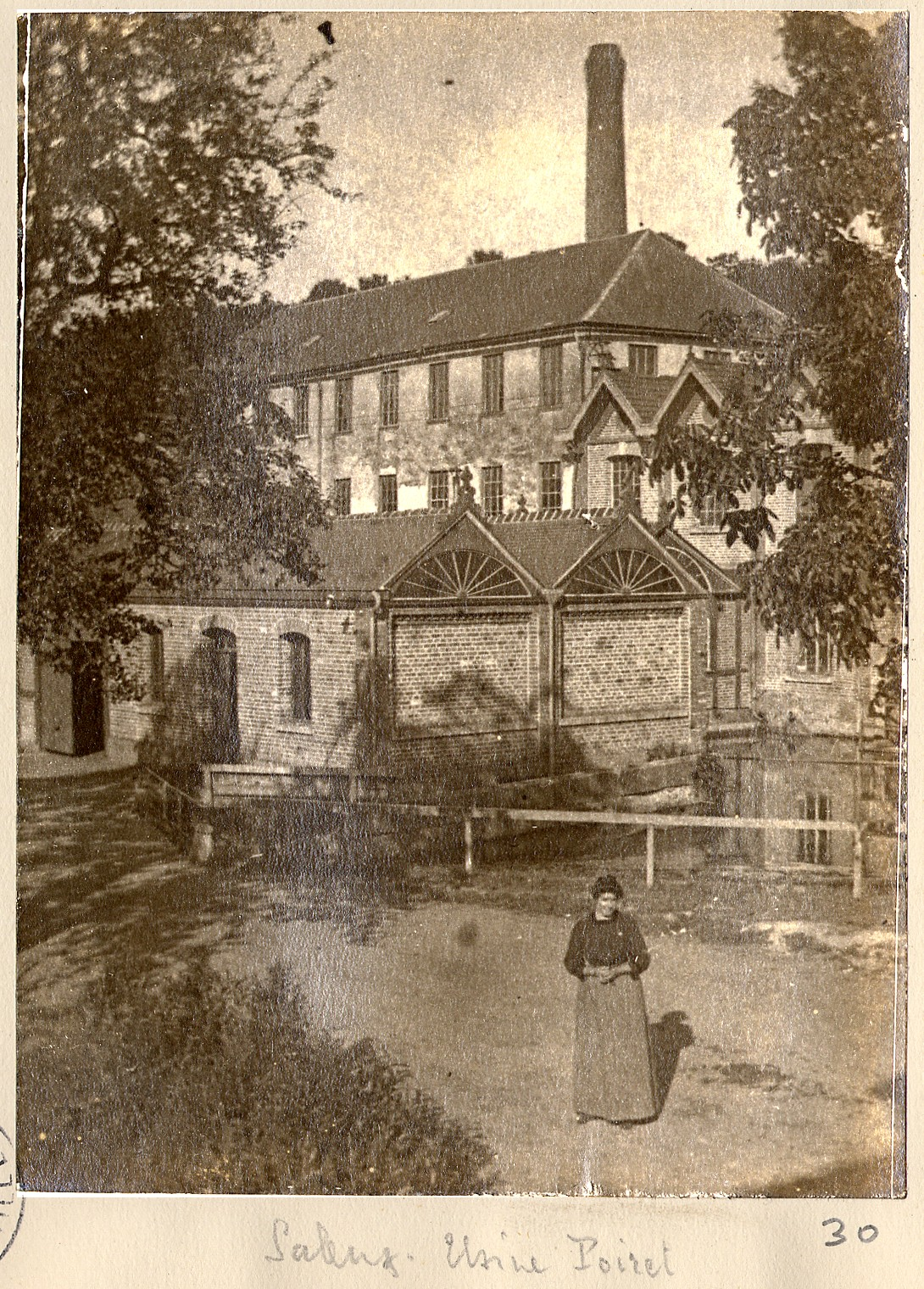 Vue d'ensemble de l'usine Poiret à Saleux (Somme). 1915. Guerre 1914-1918. Une ouvrière pose en premier plan.